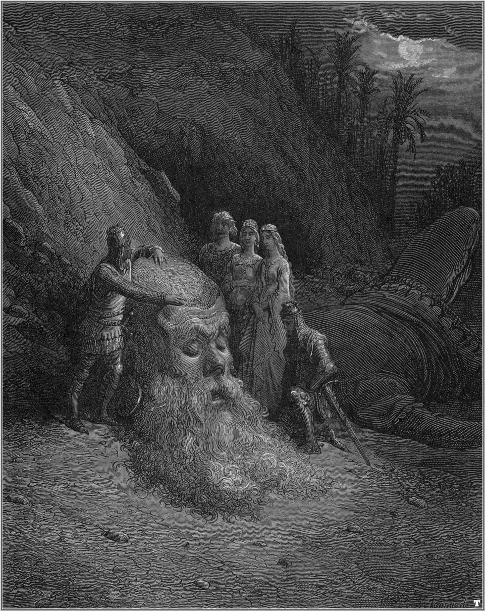 illustration of Ludovico Ariosto’s “Orlando Furioso”.